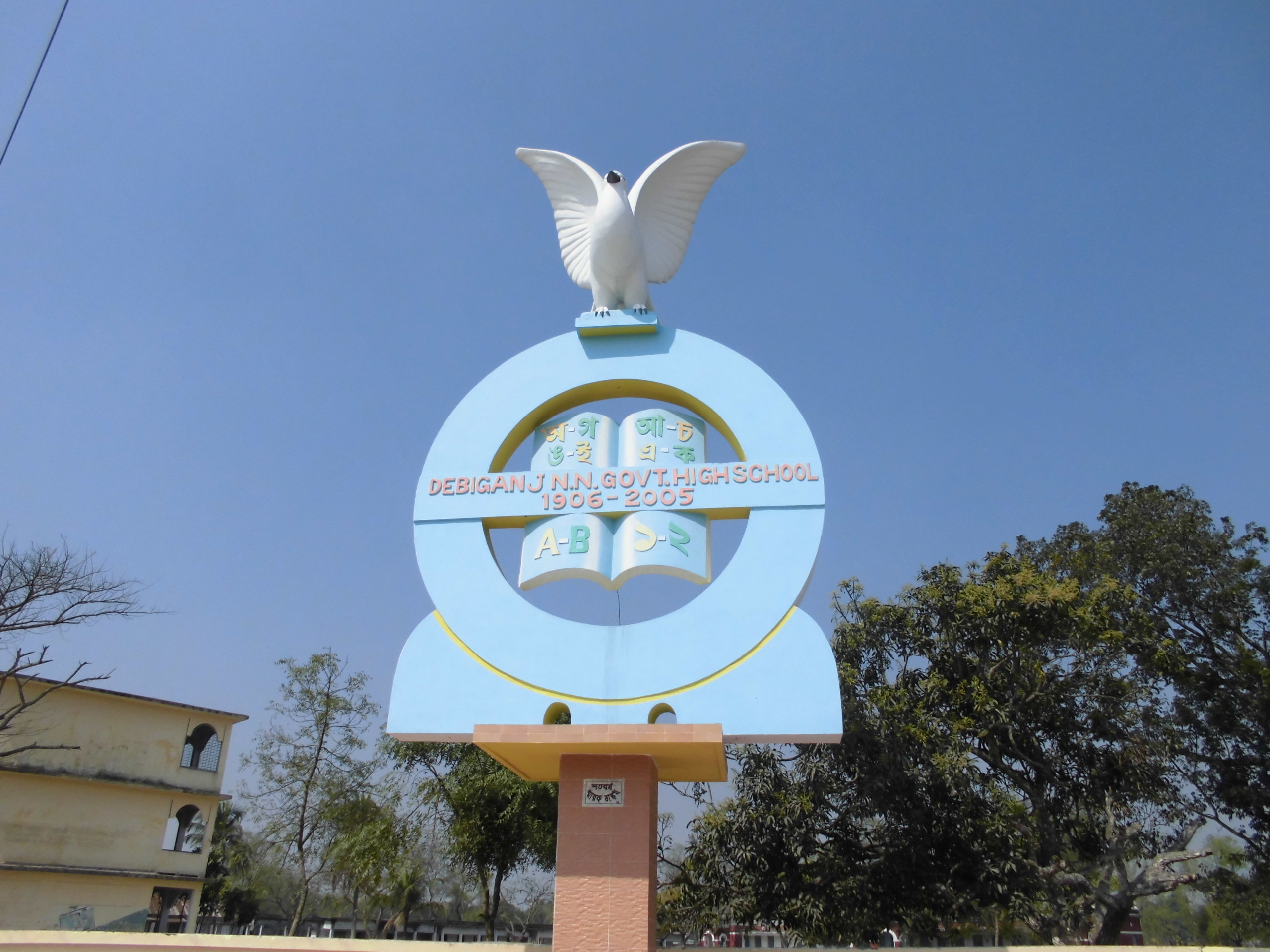 পায়রা চত্বর